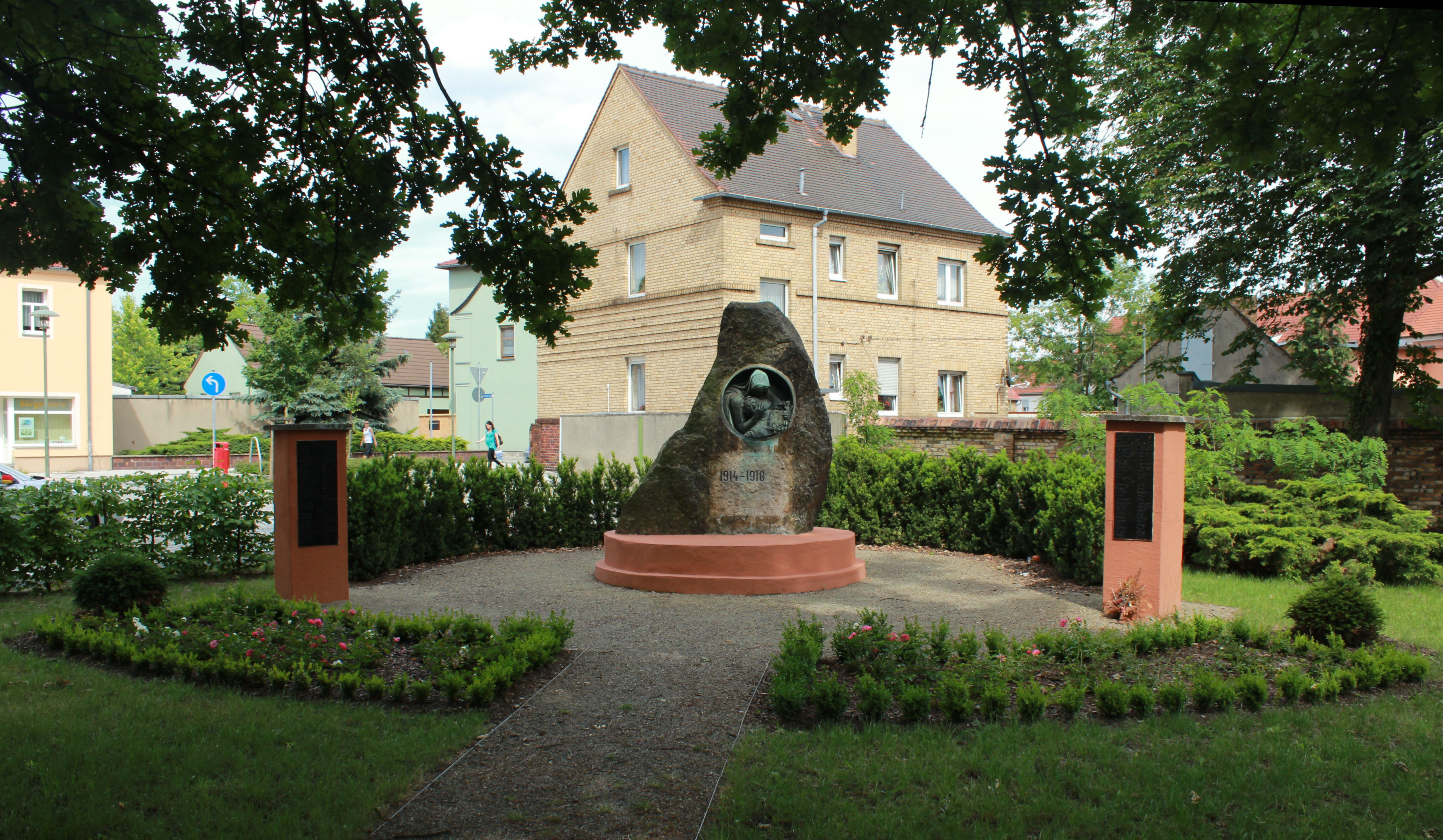 Gedenkstätte der im 1. Weltkrieg gefallenen Einwohner in Lauchhammer-Mitte (ehemals Bockwitz) an der evangelischen Kirche.